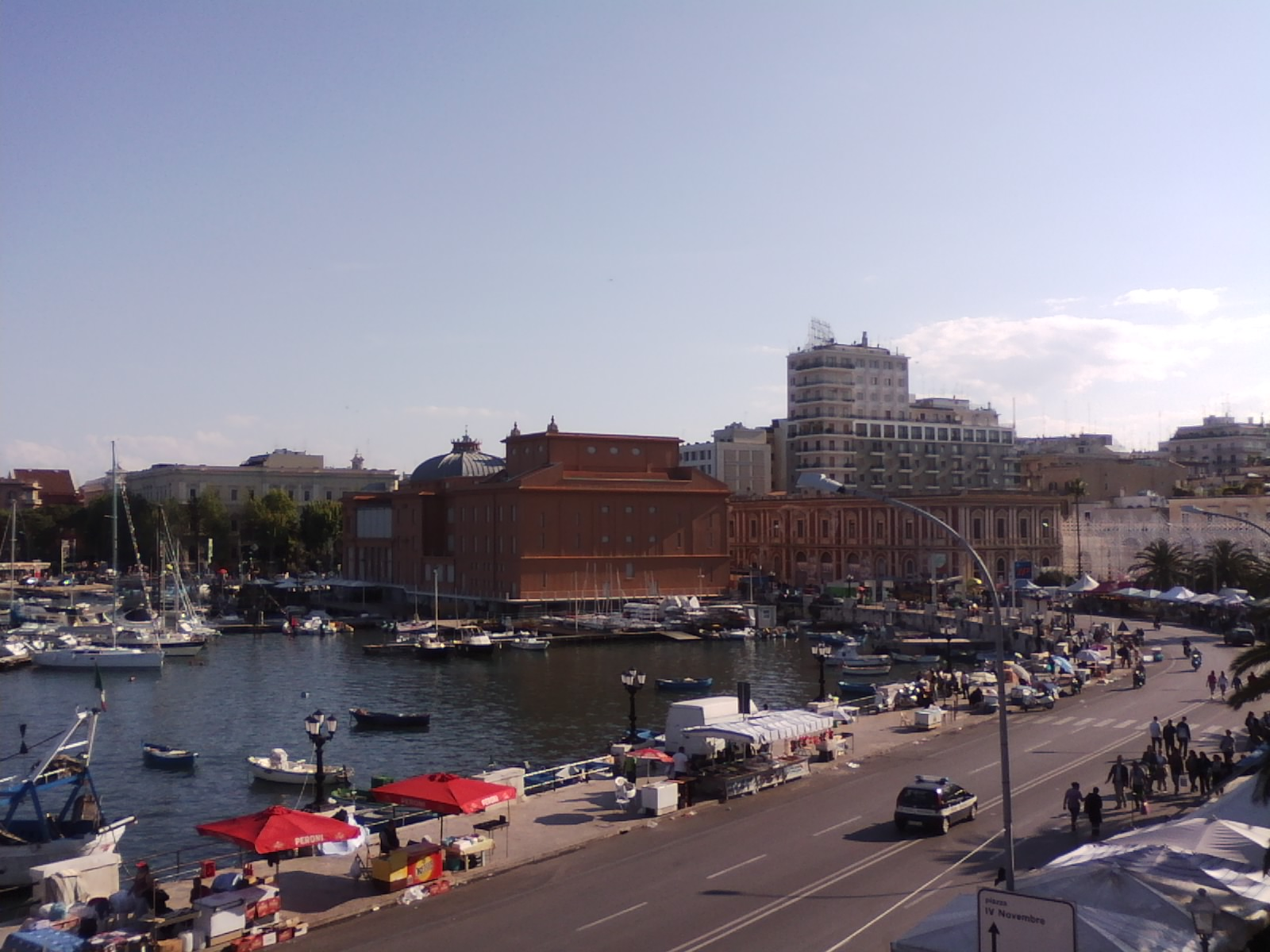 Lungomare di Bari